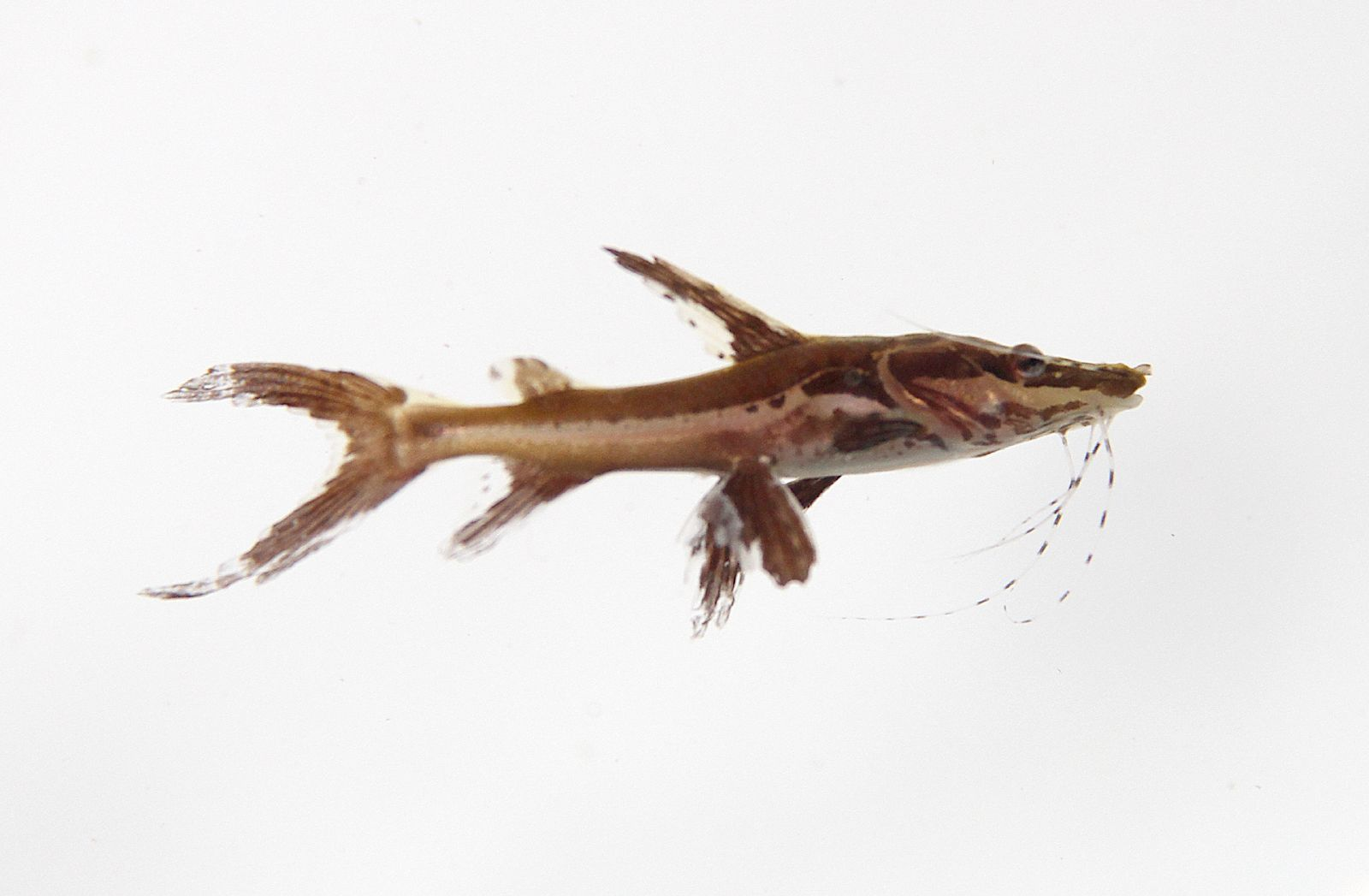 Brachyplatystoma sp (juv)